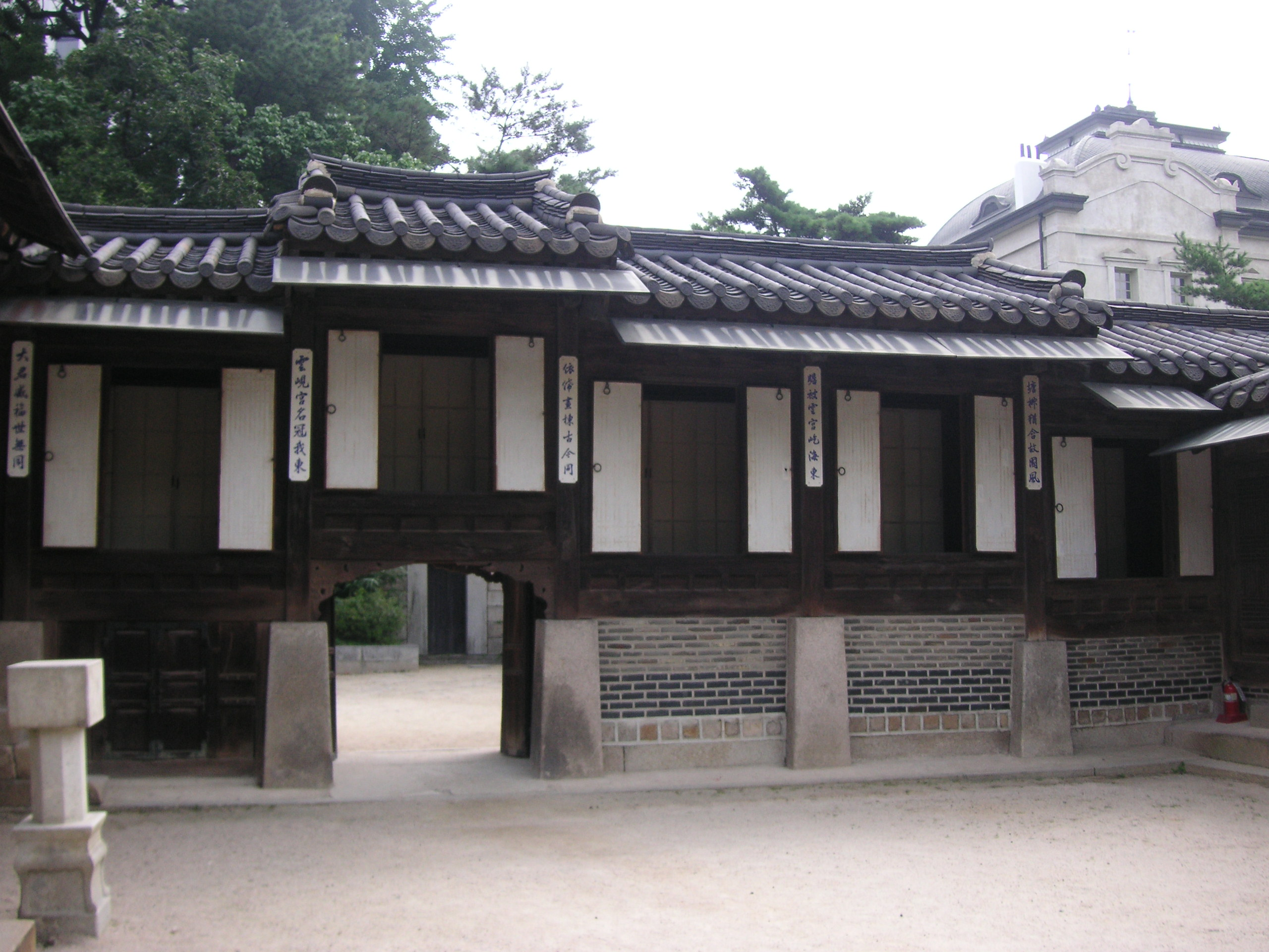 Gebäudedetail des Unhyeongung-Palastes, Seoul